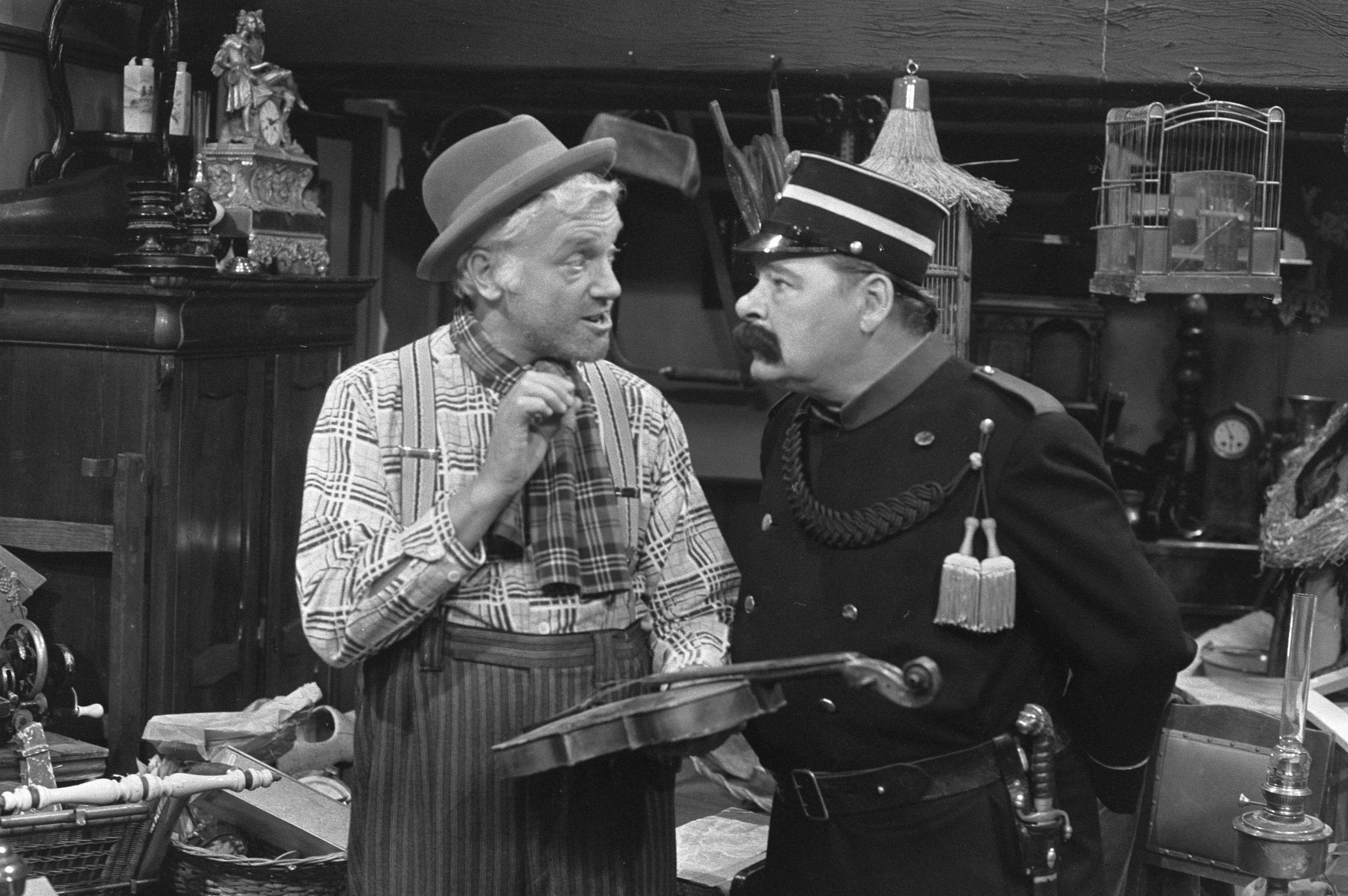 Collectie / Archief : Fotocollectie Anefo Reportage / Serie : [ onbekend ] Beschrijving : Televisieprogramma "Swiebertje", nr. 1a, 2a Piet Ekel ( Malle Pietje ) en Lou Geels als veldwachter, nr. 3a Lou Geels Datum : 6 oktober 1971 Trefwoorden : TELEVISIEPROGRAMMAS Fotograaf : Punt, […] / Anefo Auteursrechthebbende : Nationaal Archief Materiaalsoort : Negatief (zwart/wit) Nummer archiefinventaris : bekijk toegang 2.24.01.05 Bestanddeelnummer : 925-0228